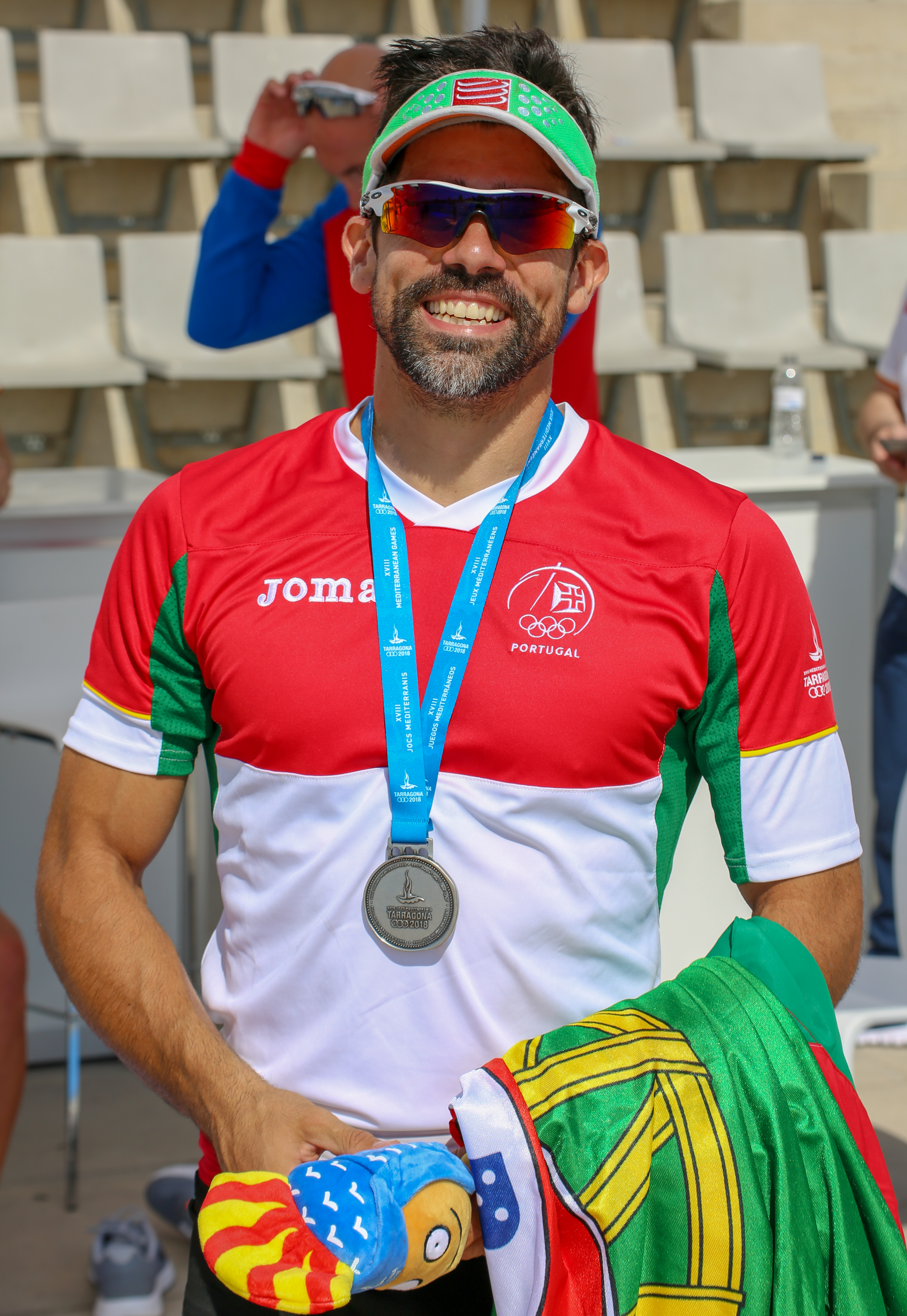 Pedro Fraga, medalla de plata en los Juegos del Mediterráneo 2018